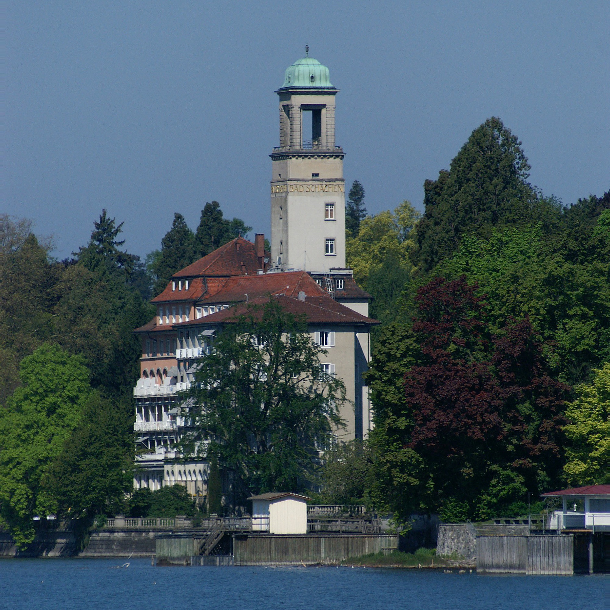 Hotel Bad Schachen, erbaut ? in Schachen (einem Stadtteil von Lindau, Insel am Bodensee). Blick von der Giebelbachstraße in Lindau.